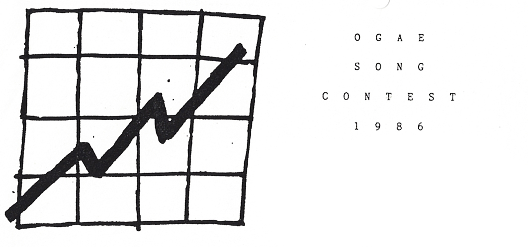 Logo del certamen Ogae Song Contest de 1986